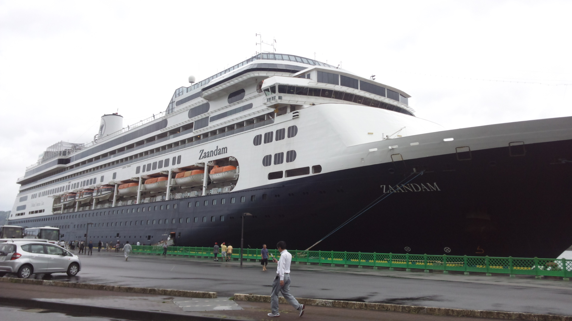 Description=Zaandam名瀬寄港